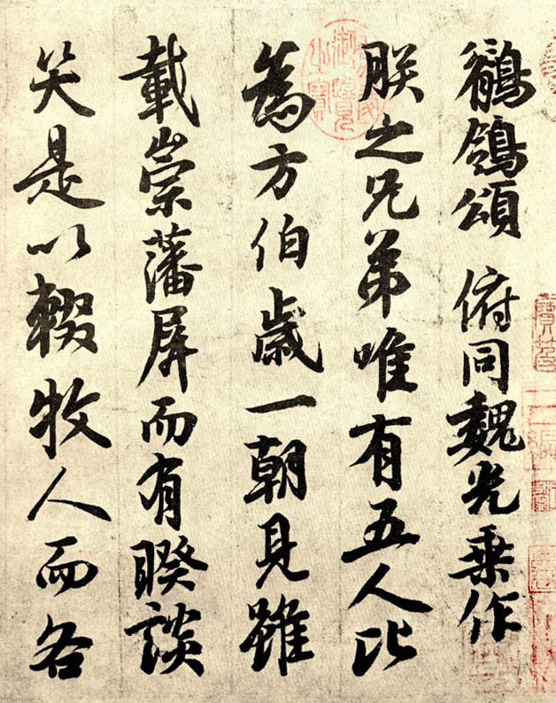 唐玄宗所书《鹡鸰颂》。此图像的真品目前为台北故宫的馆藏。